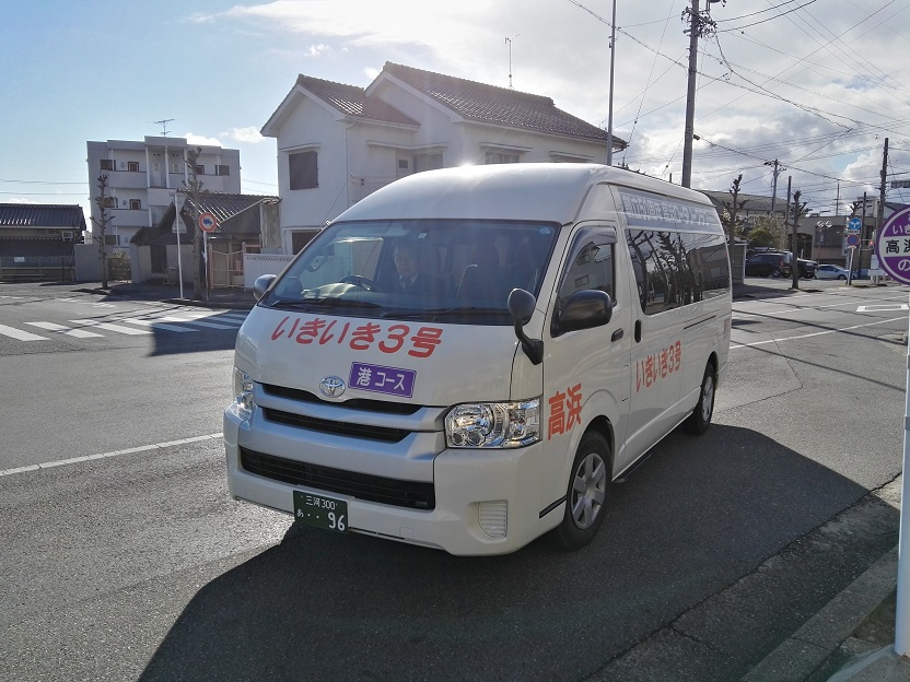 Iki-iki-gou bus